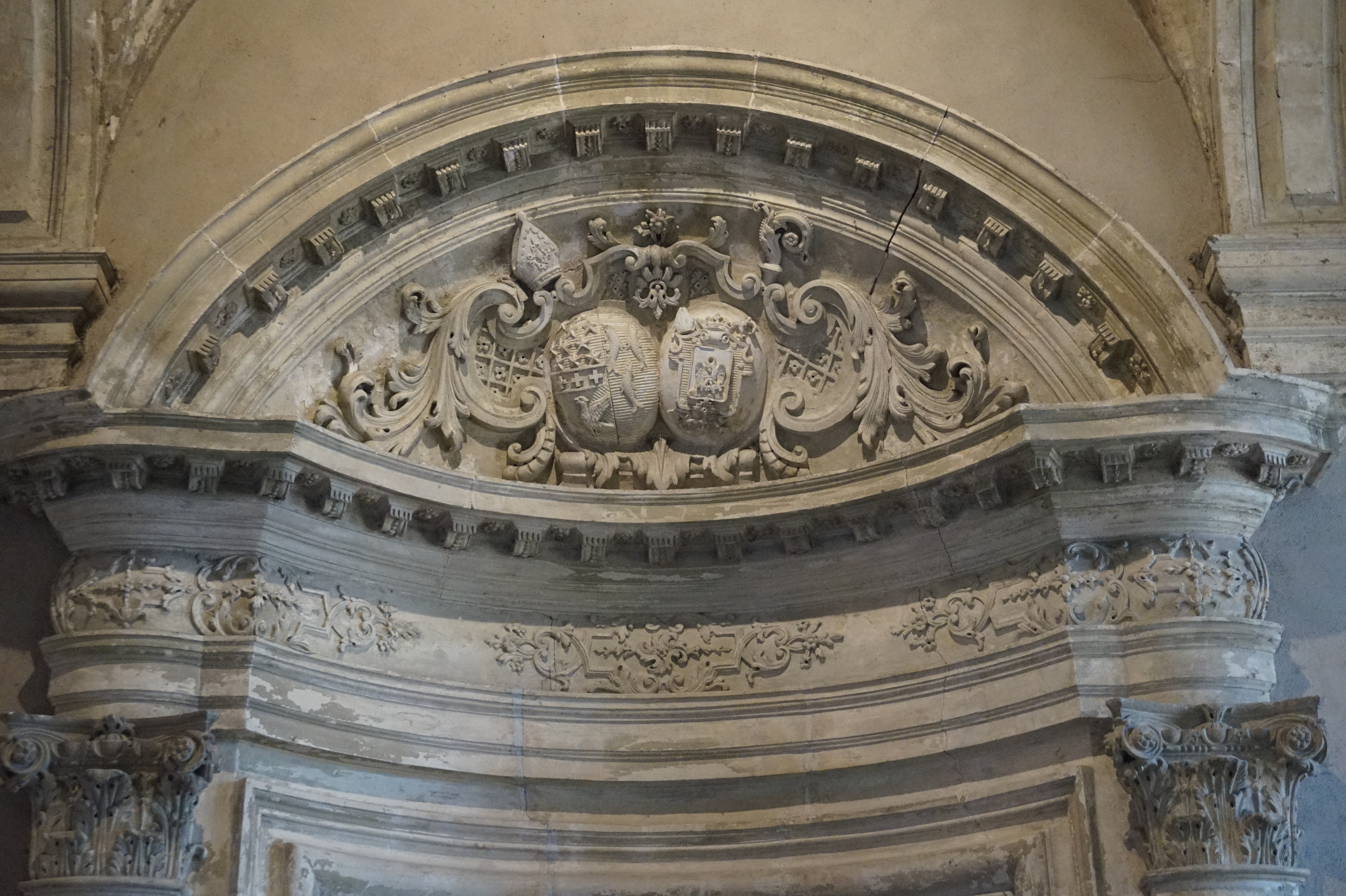 Pont-à-Mousson, abbaye des Prémontrés : parti, coupé d'azur semé d'étoiles d'argent, et de sinople au faucon essorant d'argent, à la fasce, d'or à trois croix ancrées d'argent, brochant sur le tout (blason de l'abbé Nicolas Félix, mort en 1754) ; et d'azur à trois barbeaux d'argent (blason de l'abbaye des Prémontrés de Pont-à-Mousson), d'une part ; armoiries de Mgr Lavigerie, évêque de Nancy, d'autre part.